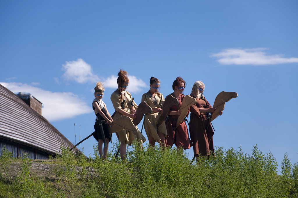 Scene fra ungdomsteateret "Vikingguten" - "Veddemålet" ved Stiklestad nasjonale kultursenter, 2010.